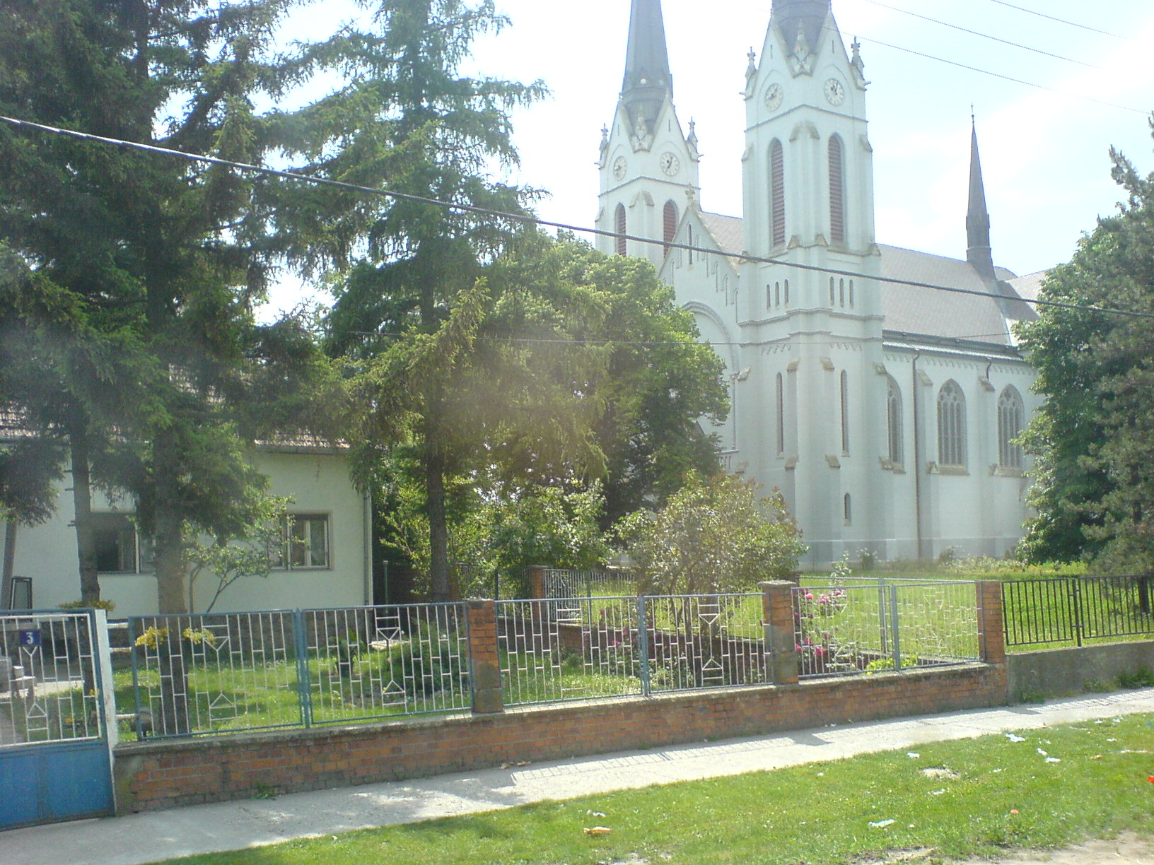 Католичка црква Исусовог срца.